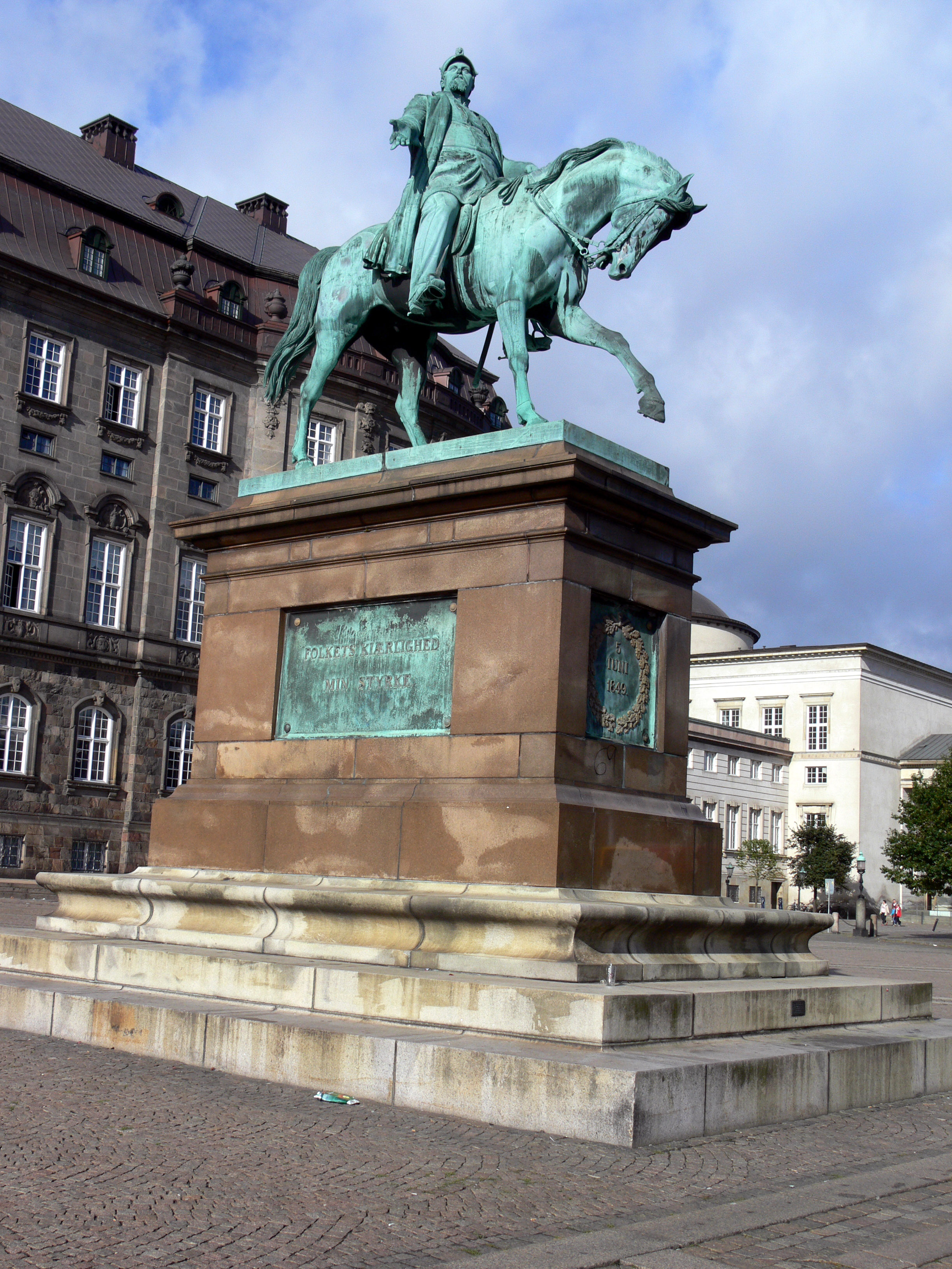 Friedrich VII., König von Dänemark und Norwegen 1848–1863